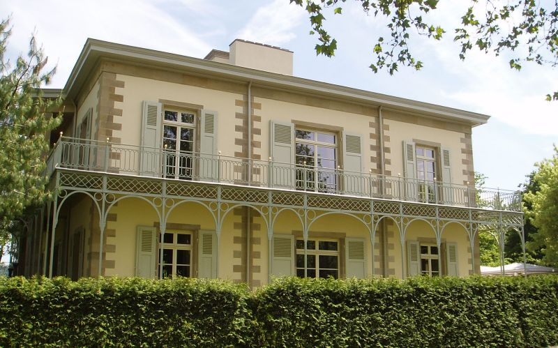 Esslingen am Neckar - Weil - Königlicher Pavillon Fotografiert: selbst